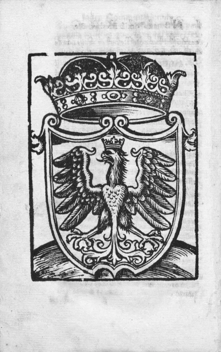 Drzeworyt z pierwszego wydania O NAPRAWIE RZECZYPOSPOLITEJ, FRYCZA MODRZEWSKIEGO